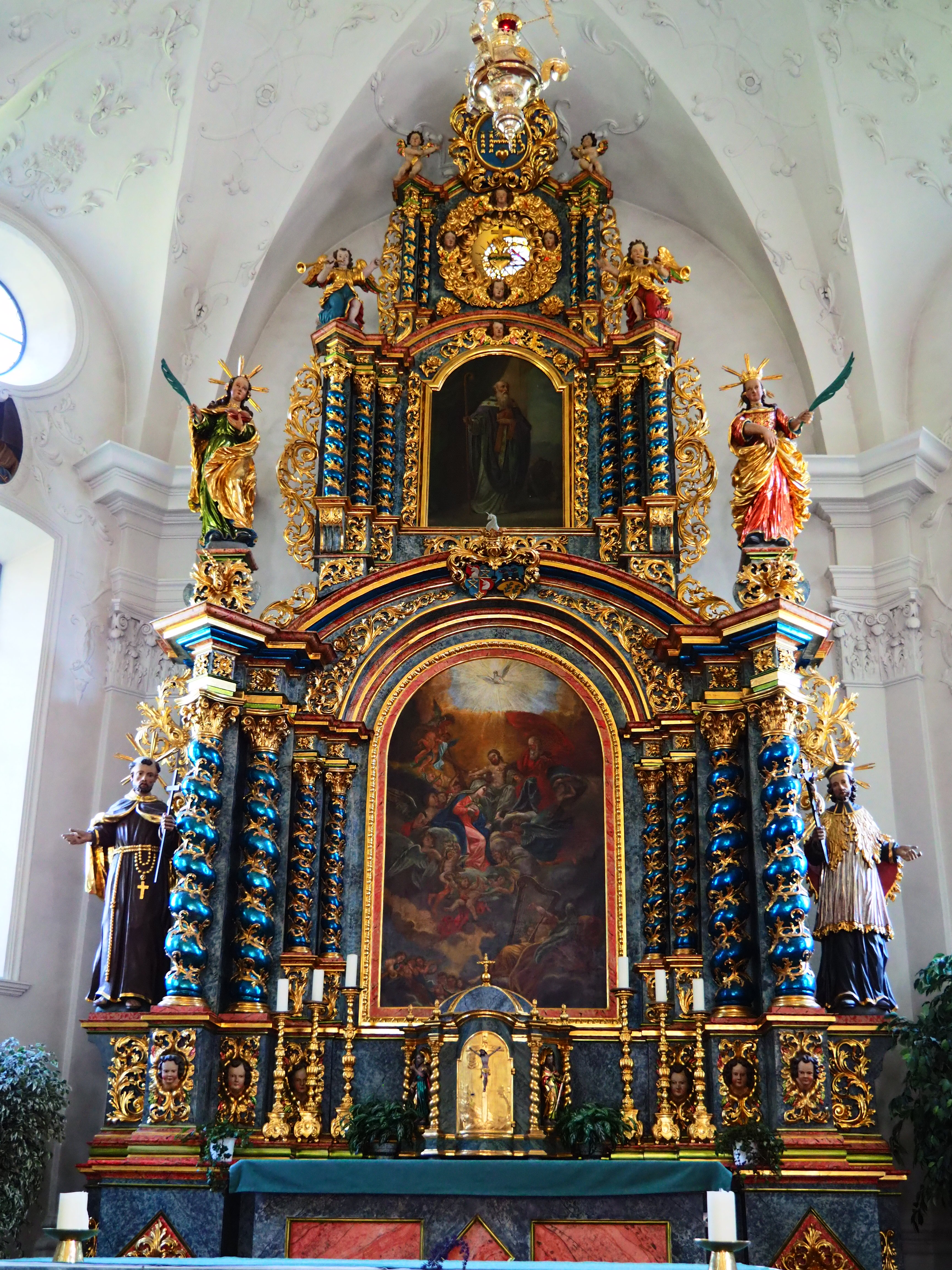 Altar der St. Galluskirche in Wassen, UR, Schweiz (1735 erbaut)